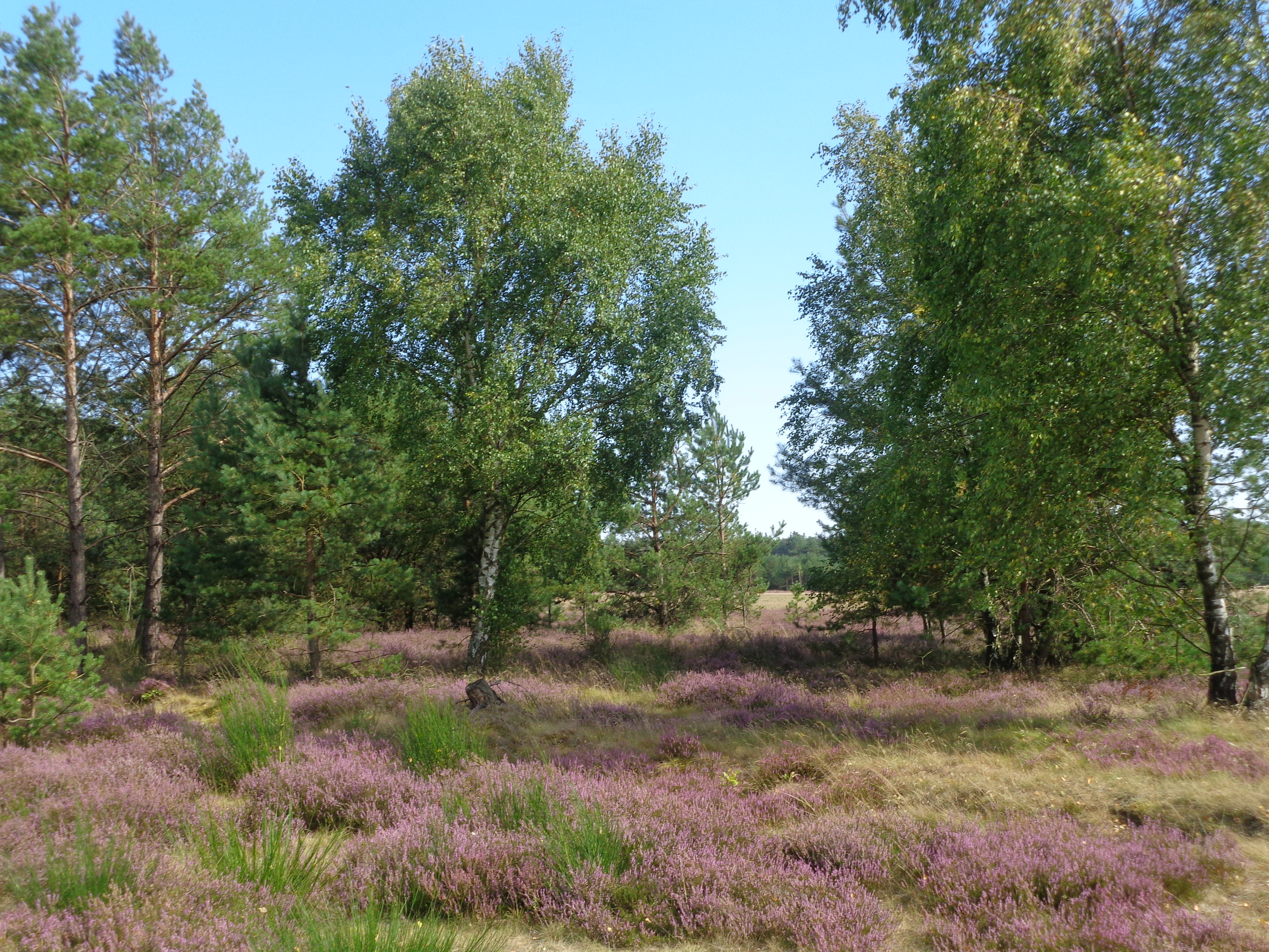 Retzower Heide in Südmecklenburg